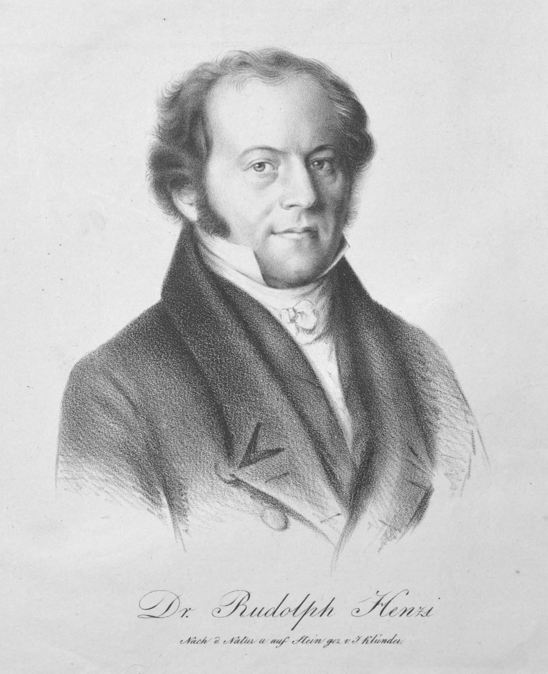 Dr. Rudolph Henzi: Nach d. Natur u auf Stein gez. v. J. Klünder. 16,5 x 13,6 cm